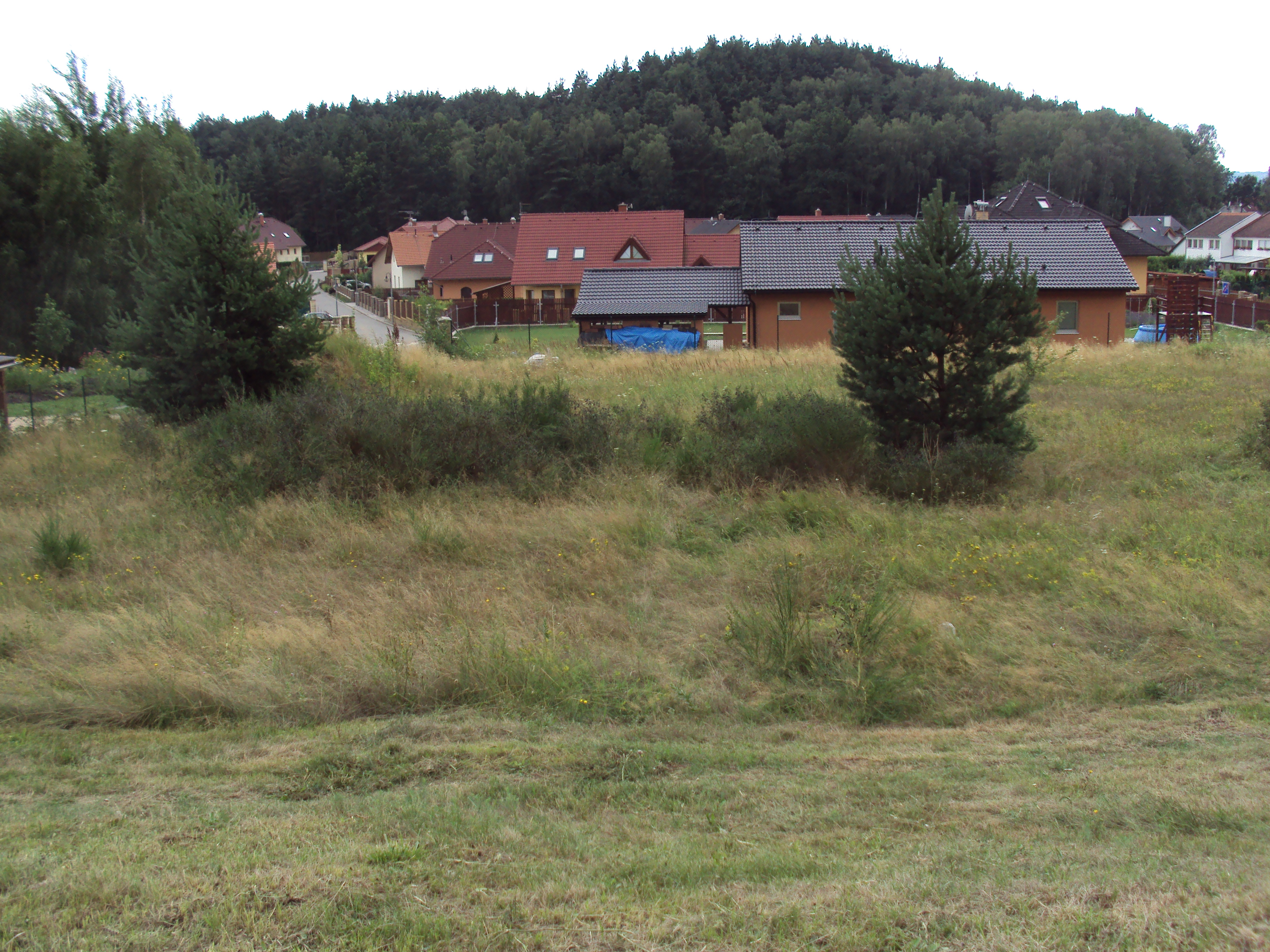 Česky: Pohled na vrch Hůrka nad čtvrtí Svárov